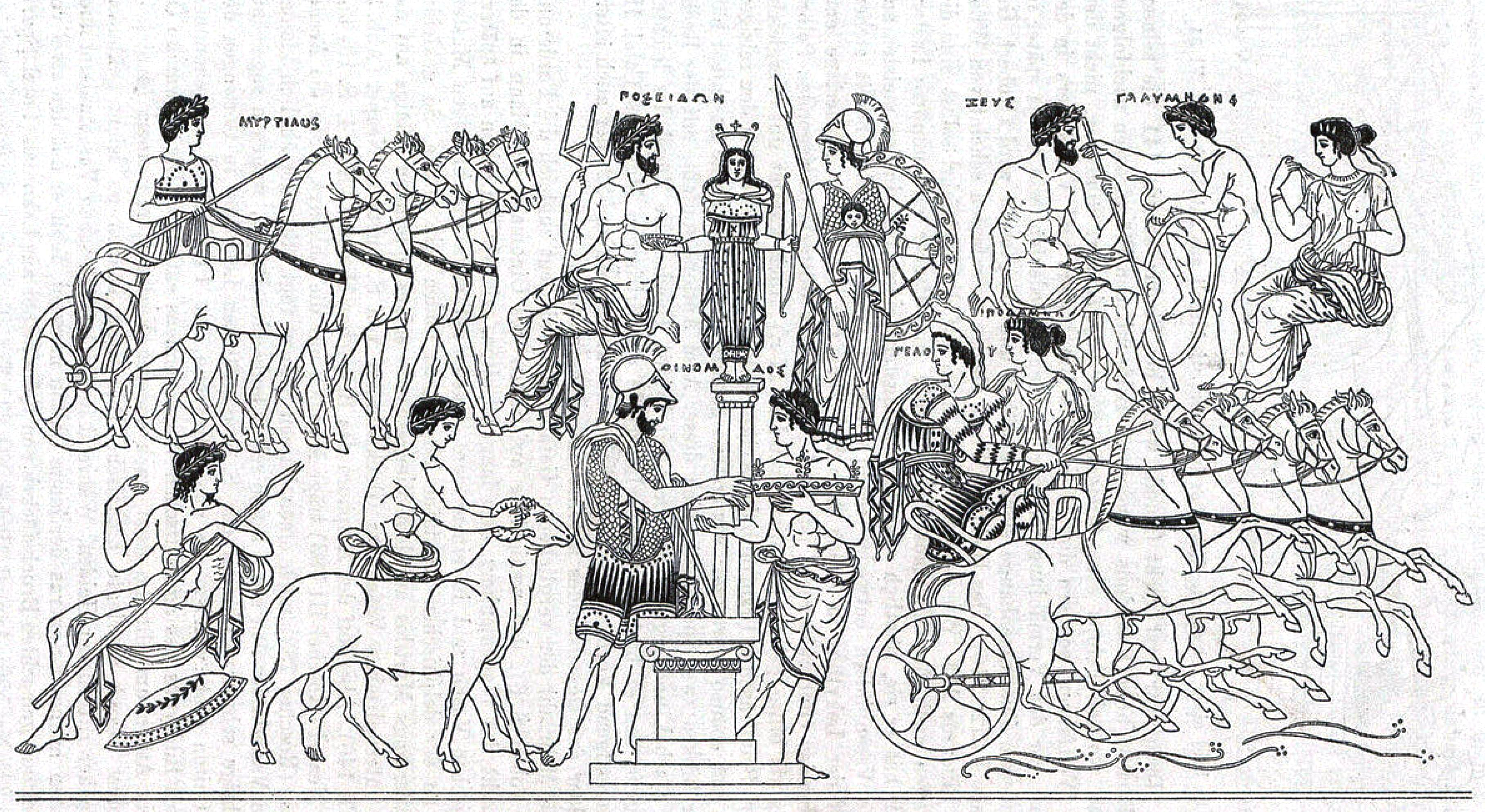 Rotfiguriger Krater: Pelops und Oinomaos Neapel (Napoli), Museo Archeologico Nazionale Inv.-Nr. F 94